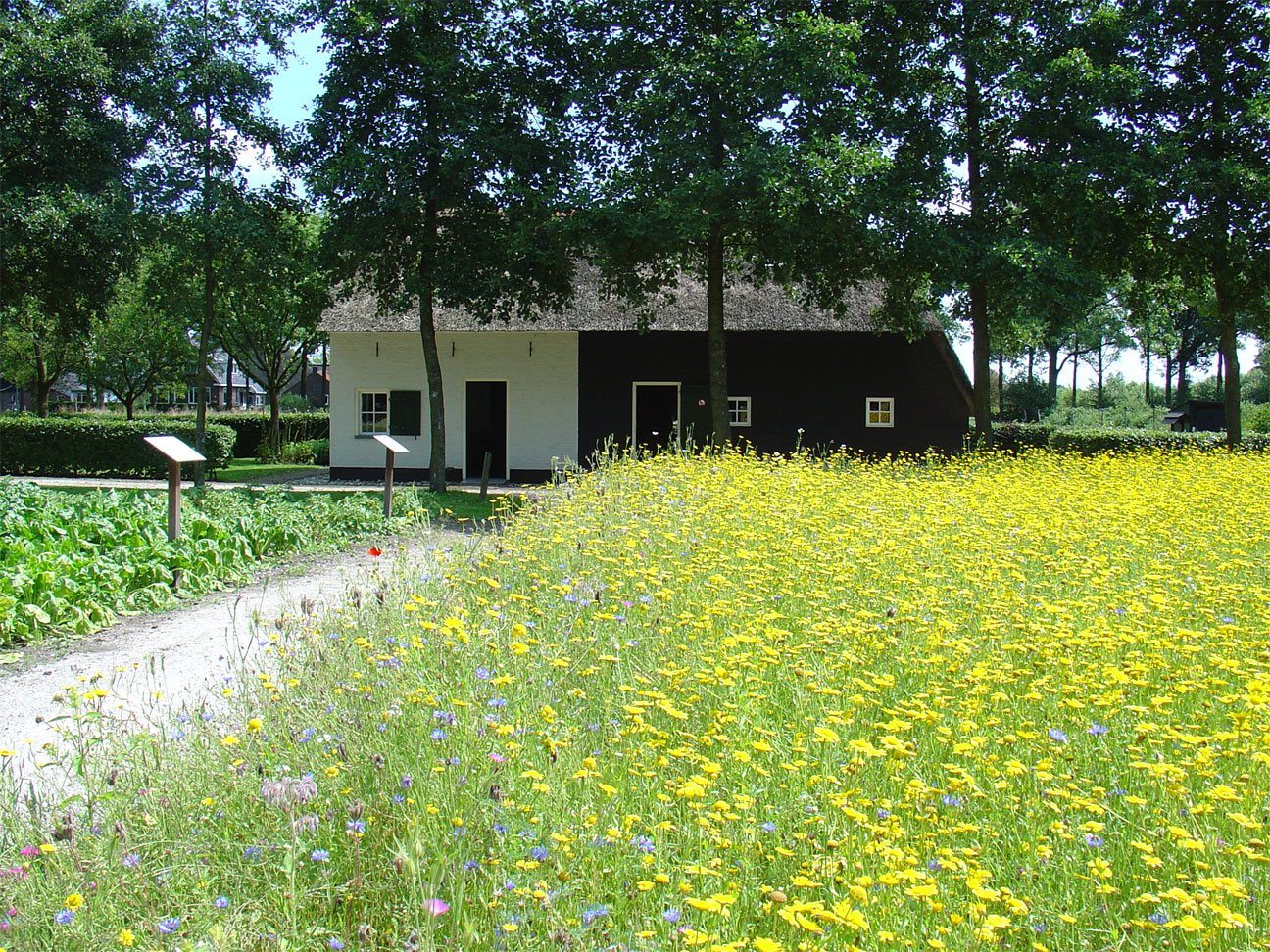 Museum De Koloniehof in Frederiksoord - kolonistenwoning +akker